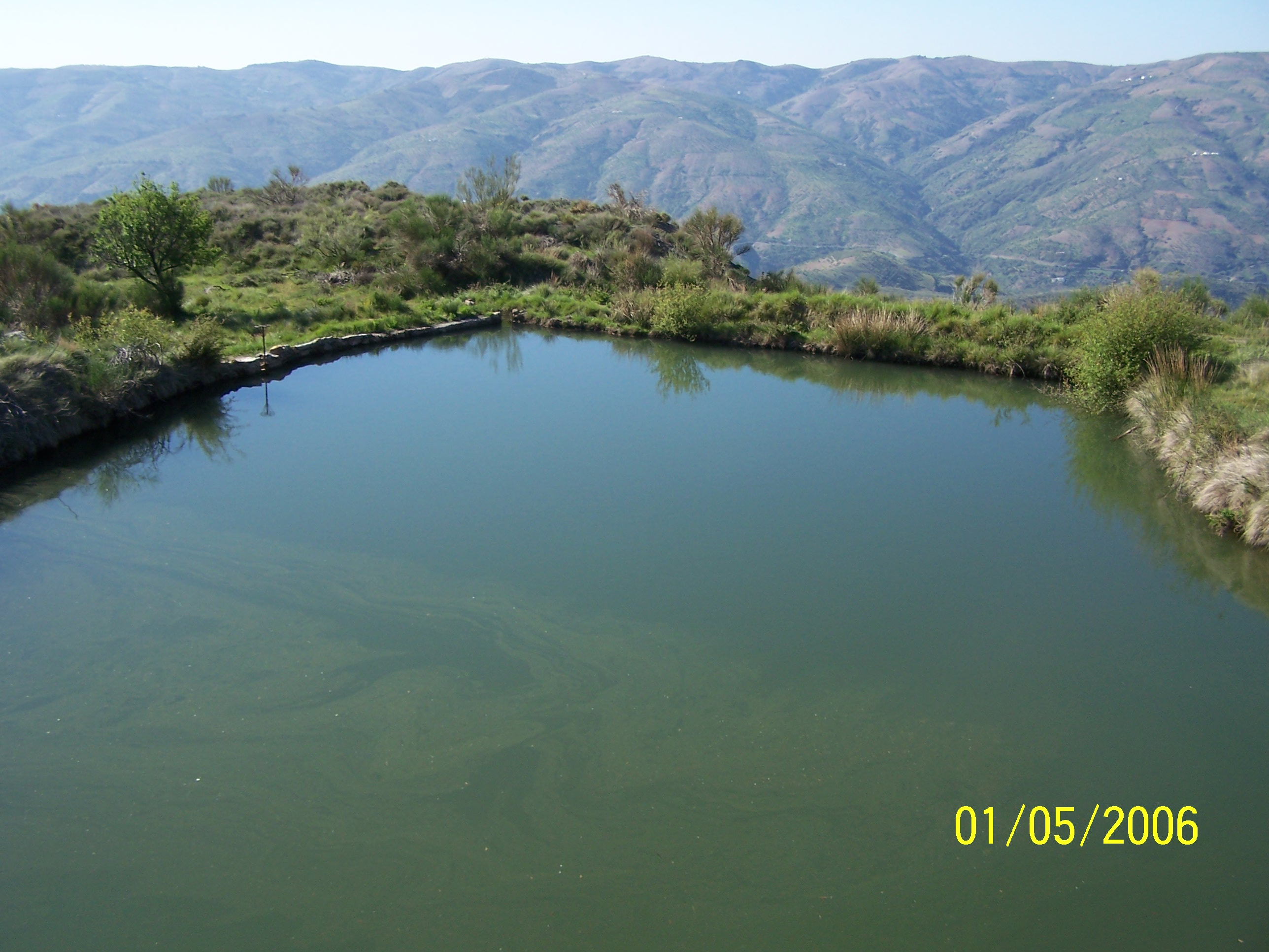 Alberca en la Alpujarra, en Cástaras